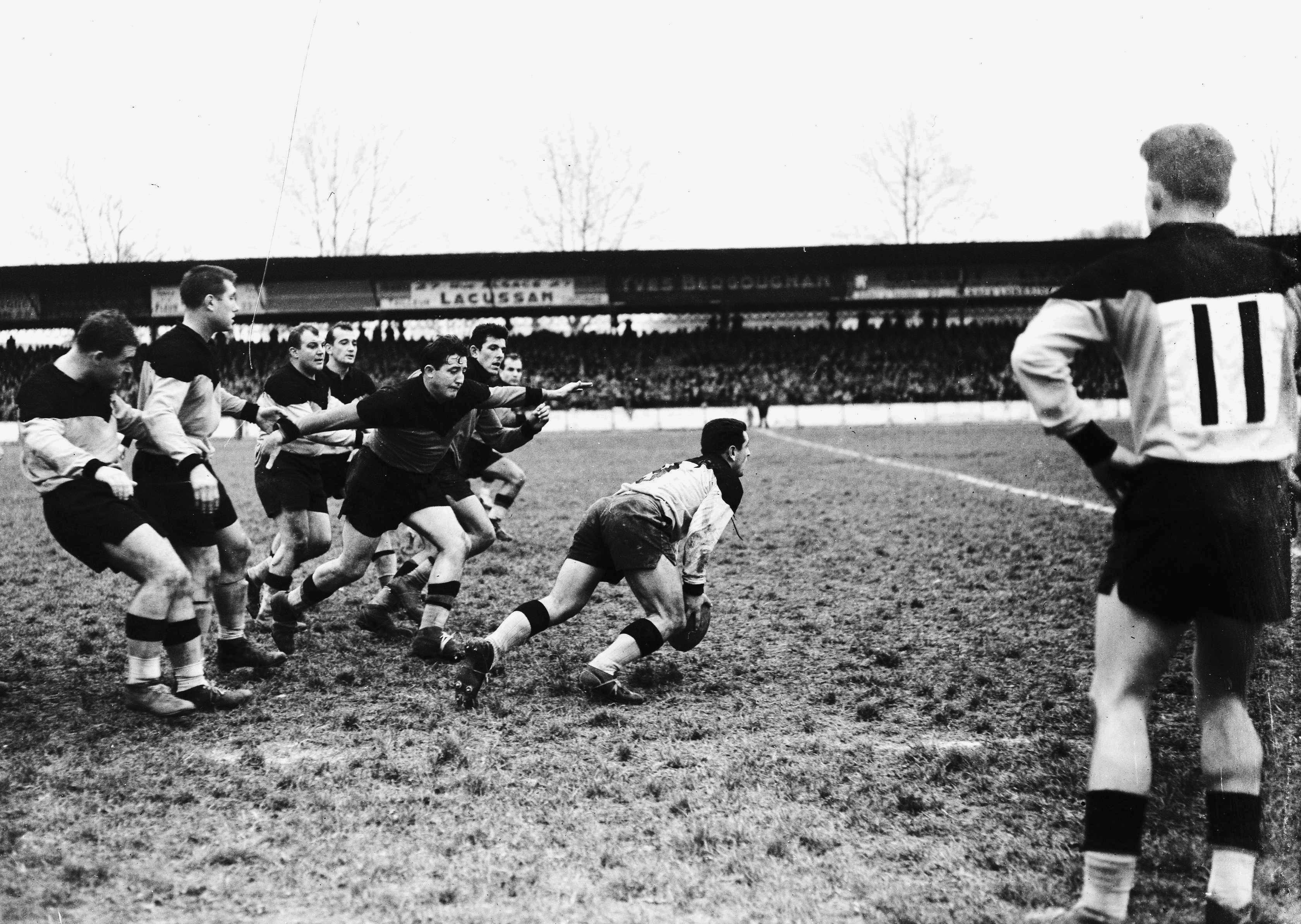 Stade de Mont-de-Marsan. Le 8 Décembre 1957. Vue d'une phase de jeu entre le Stade Toulousain et Mont-de-Marsan.